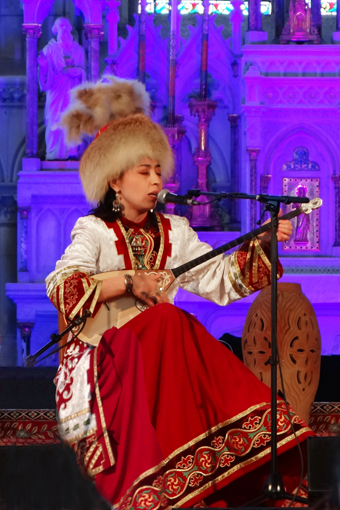 Ulzhan Baibussynova, chant et luth dombra Kazakhstan Concert Bardic Divas Les poétesses de l'Asie Centrale Kazakhstan et Ouzbékistan dans le cadre du festival Les Orientales Musiques et traditions d'Orient Saint-Florent-le-Vieil